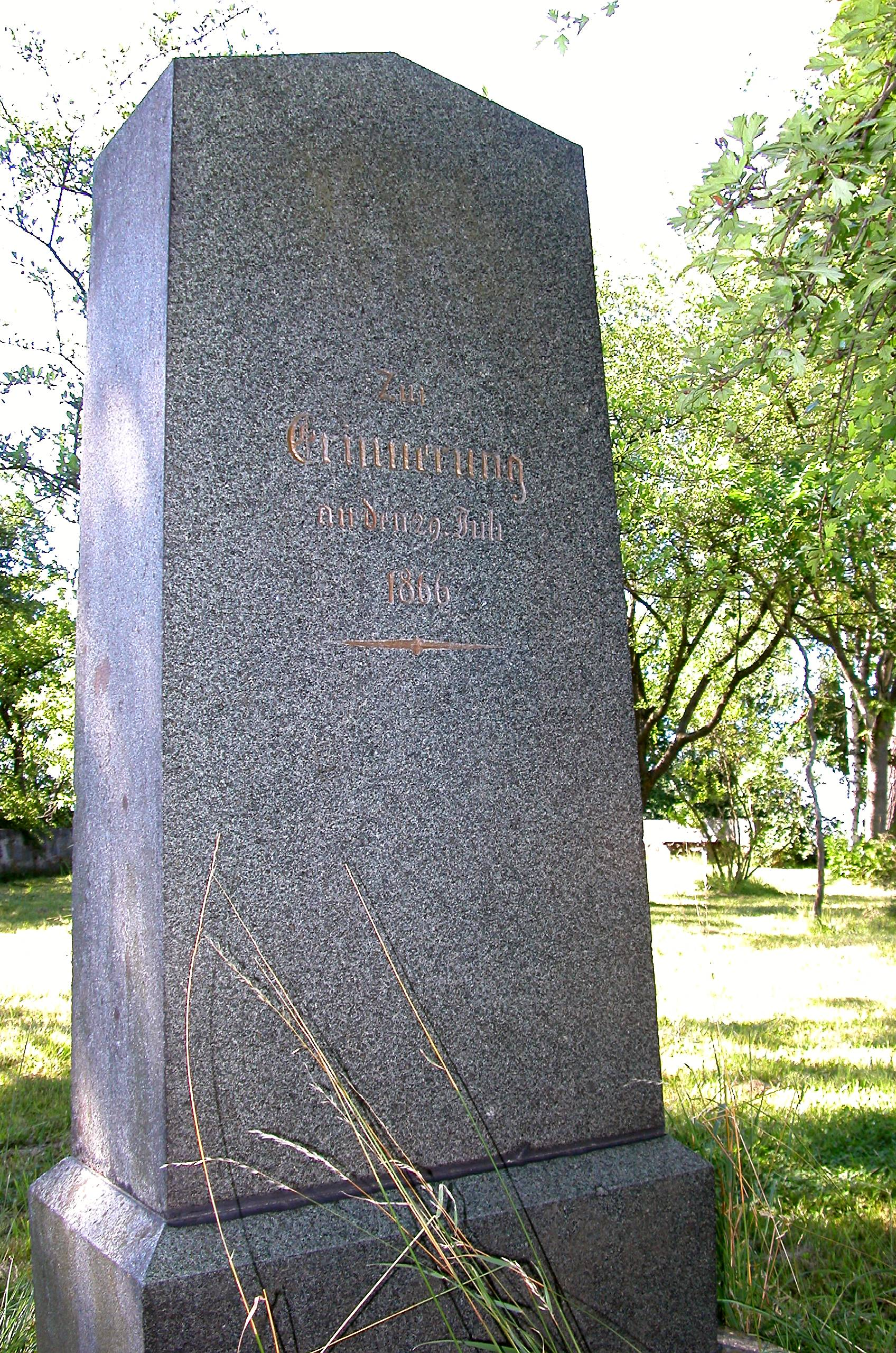 Gedenkstein an ein preußisch-bayerisches Gefecht am 29. Juli 1866, Denkmal Nr. D-4-72-188-7